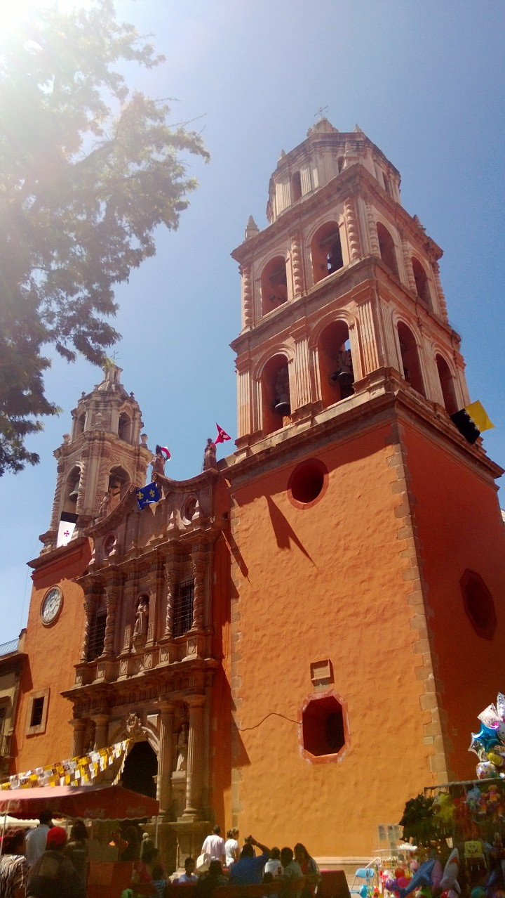 La Iglesia de San Francisco, en la plaza del mismo nombre, en San Luis Potosí, San Luis Potosí, México